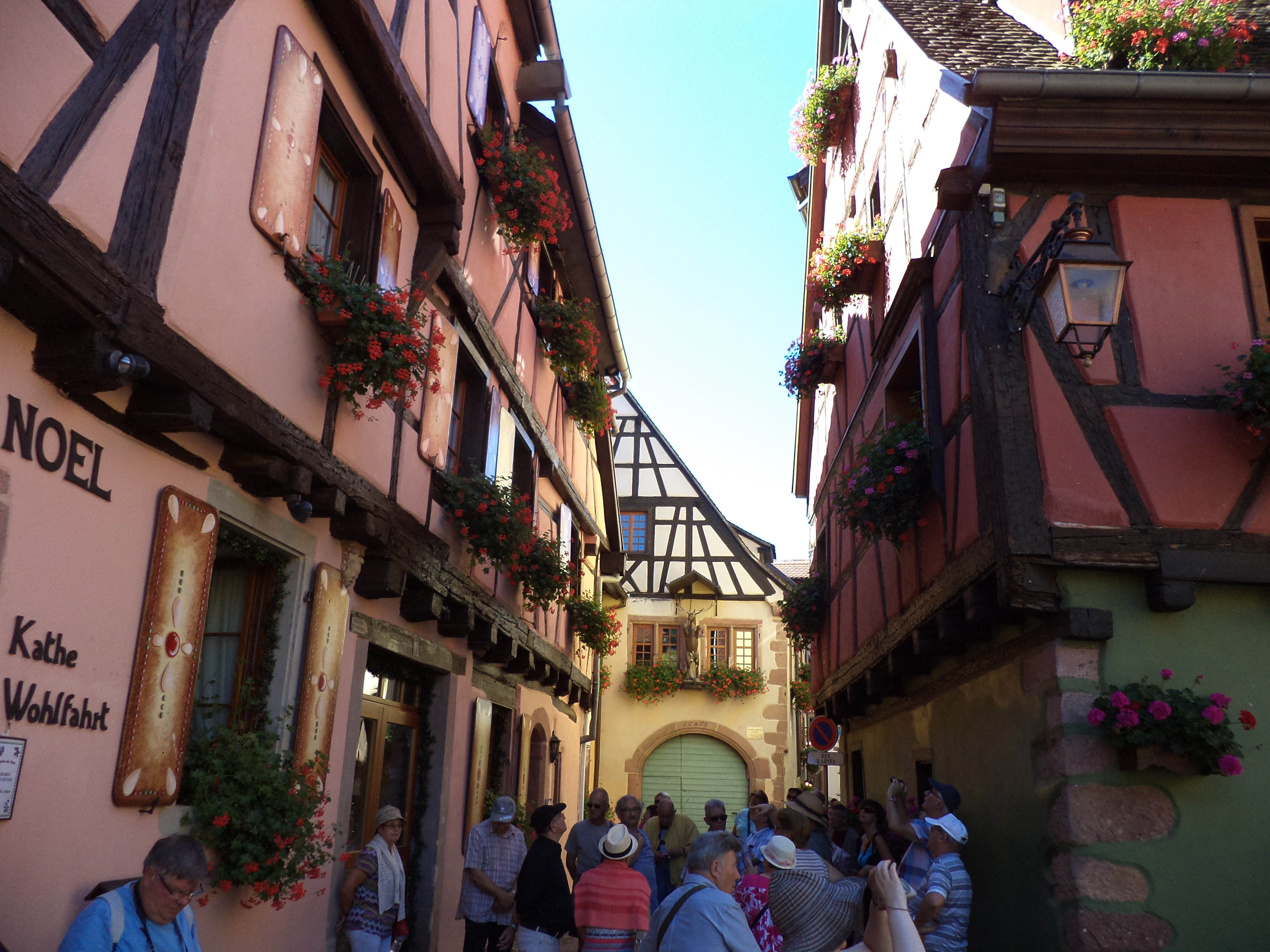 Χαρακτηριστικά Αλσατικά σπίτια χτισμένα με μπαγδατί.